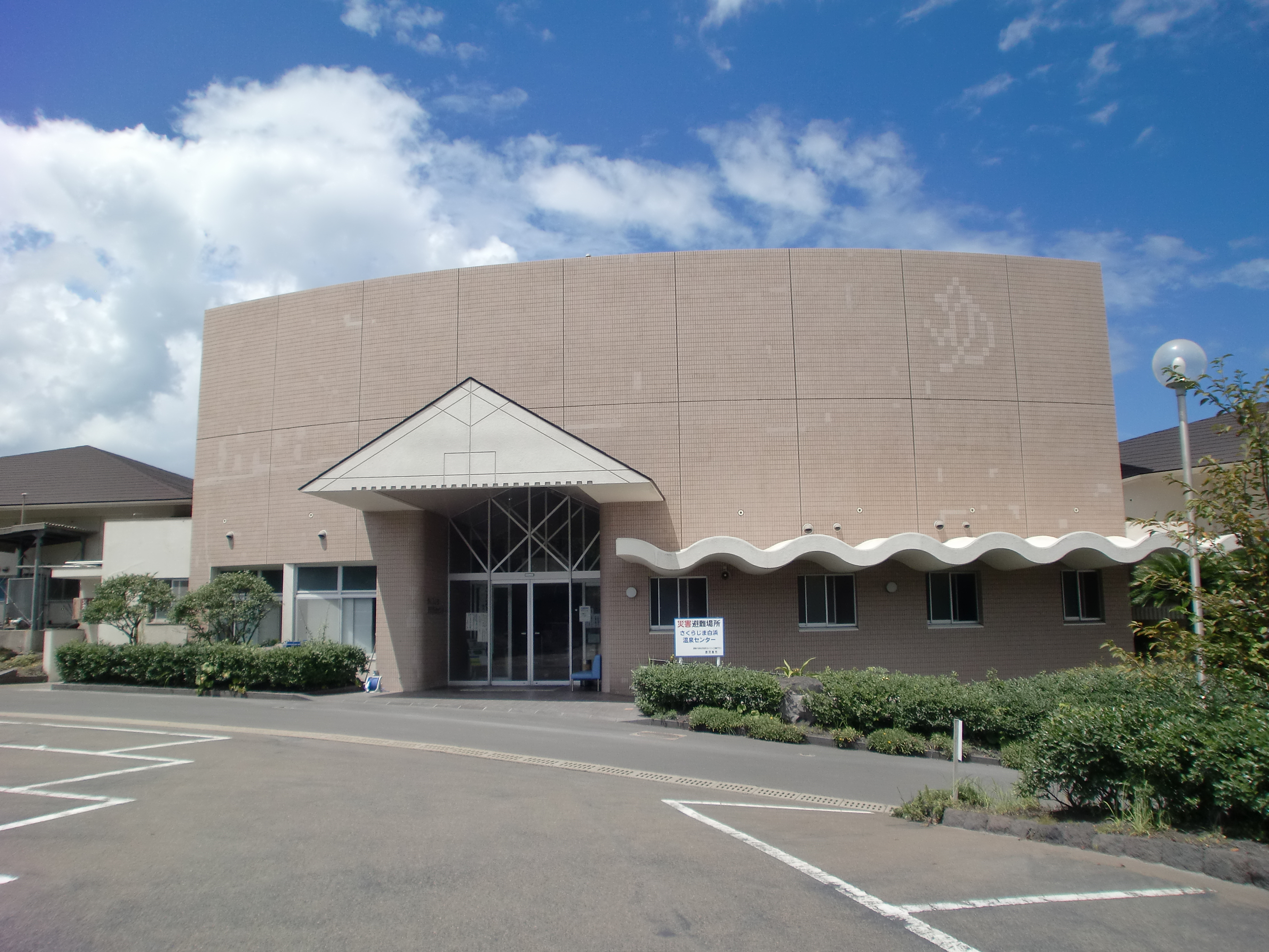 鹿児島市桜島白浜町にあるさくらじま白浜温泉センターの外観。